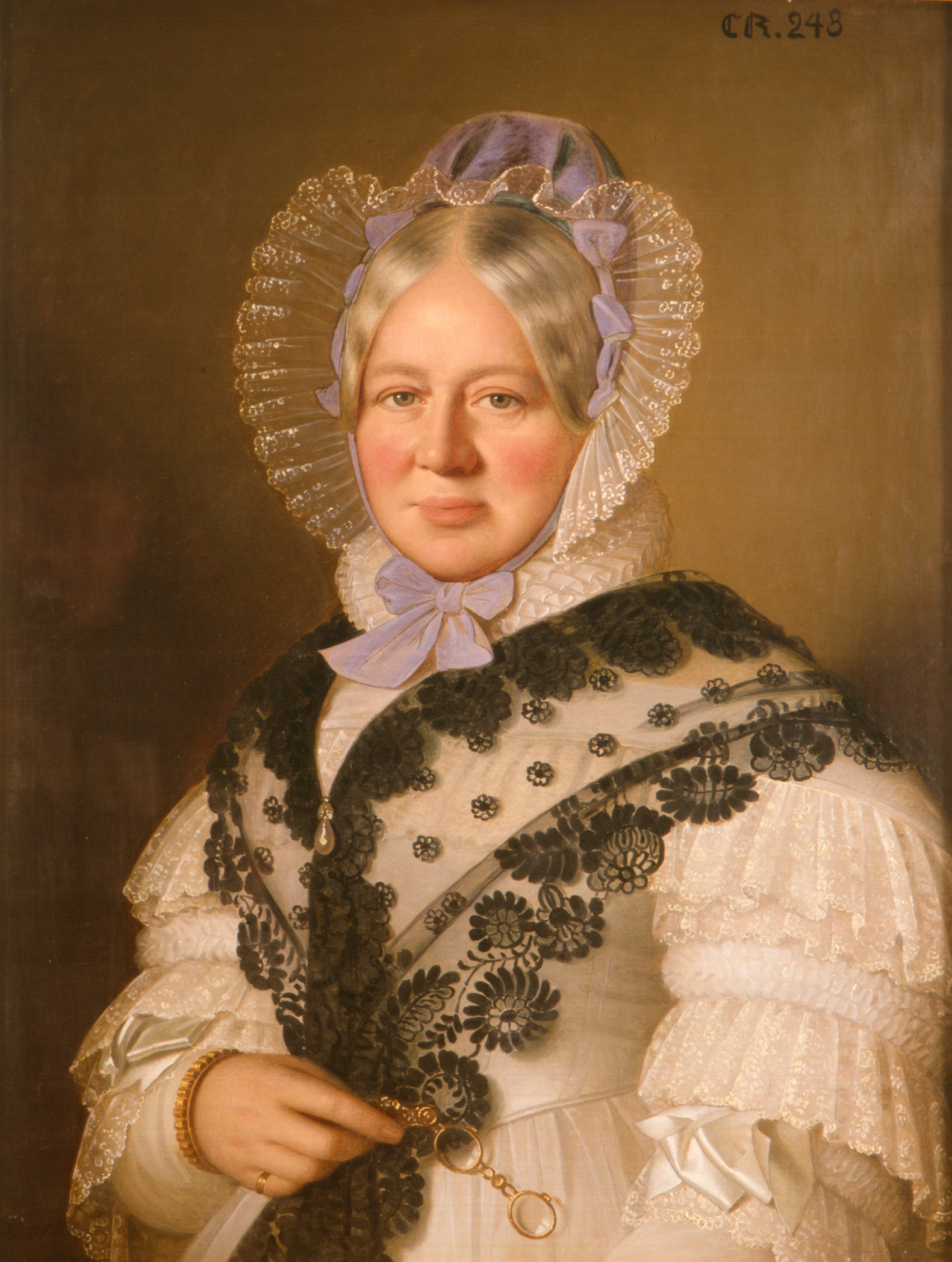 Henriette, Duchess of Württemberg